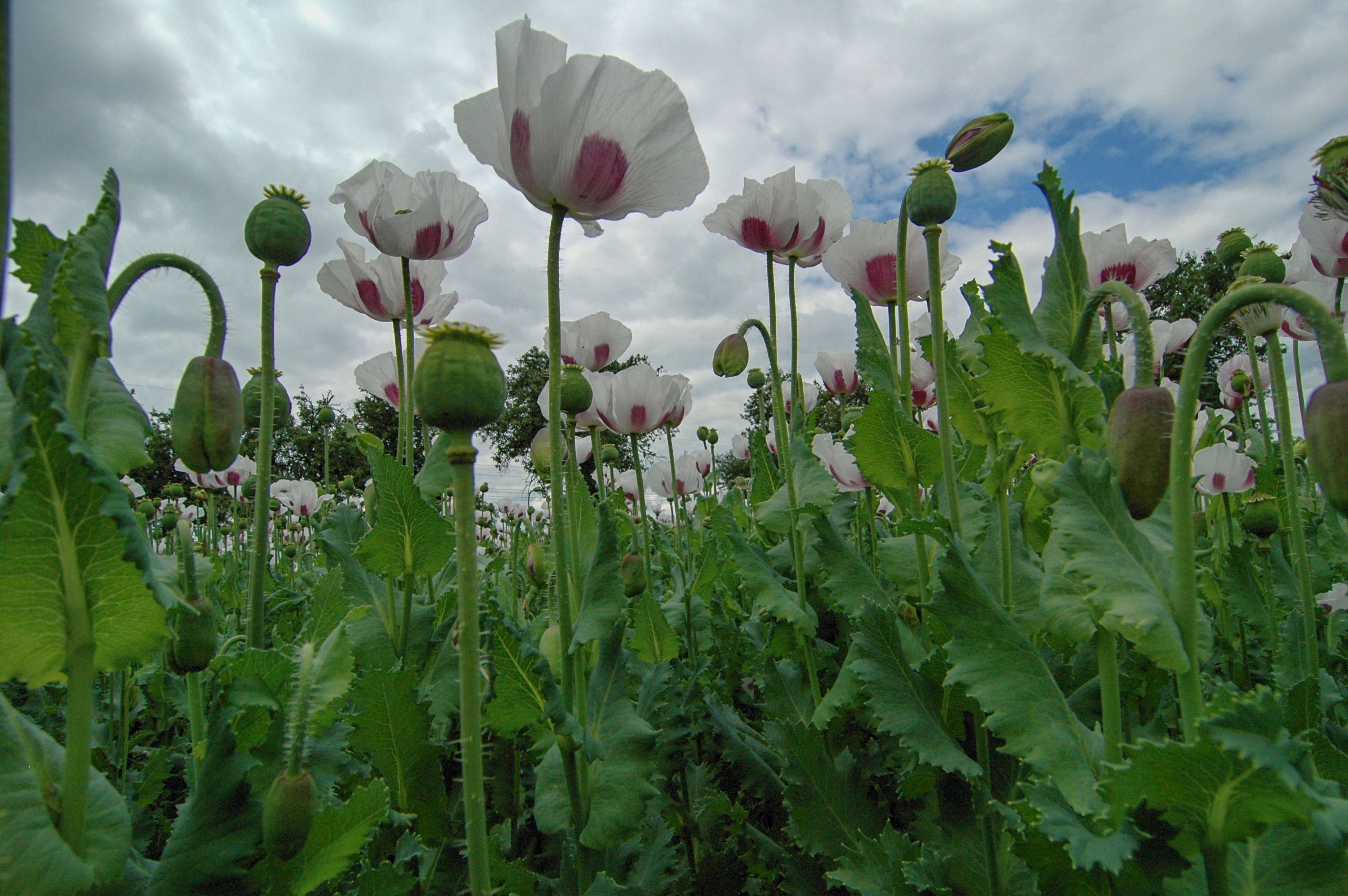 Červený Újezd, o.Praha-západ, Výzkumná stanice ČZU v Praze, Český modrý mák, bíle kvetoucí odrůda (převažuje u potravinářských máků)